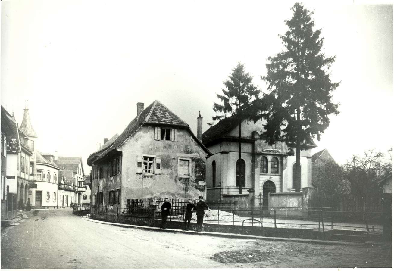 Synagoge Bühl (Baden) Nutzungsbedingungen ausdrücklich auch für Wikipedia (siehe: [1]